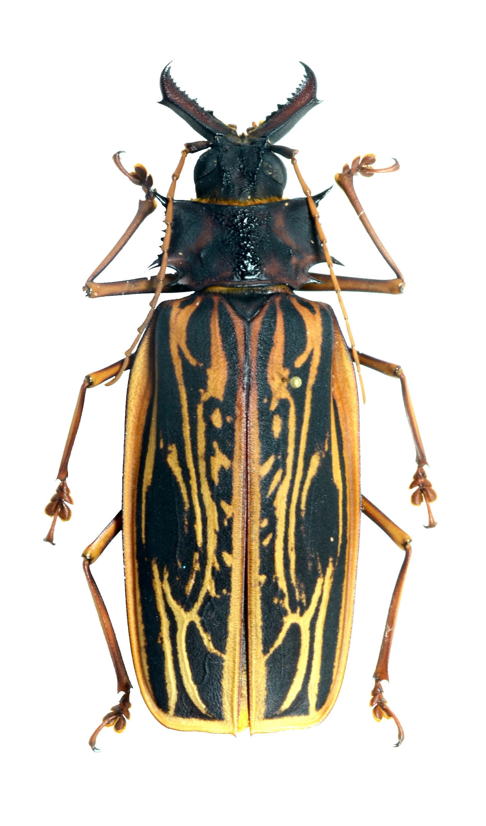 Cerambycidae: Macrodontia dejeanii